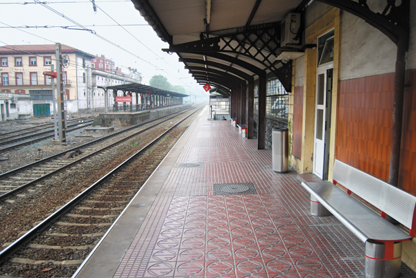 Estación de Desertu-Barakaldo de Renfe Cercanías - Adif